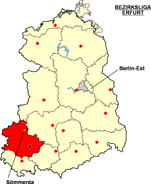 Localisation de Sömmerda dans la "Bezirksliga Erfurt" Catégorie:Logo de clubs de football - Allemagne